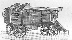 dessin de batteuse année 1897